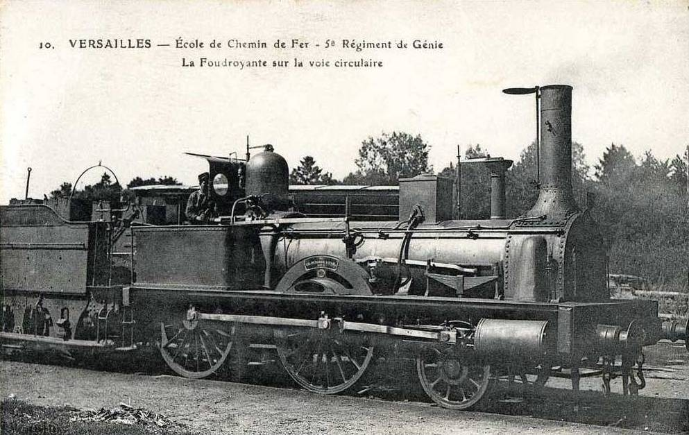 Versailles, Ecole de Chemin de fer, 5e régiment de génie, La Foudroyante